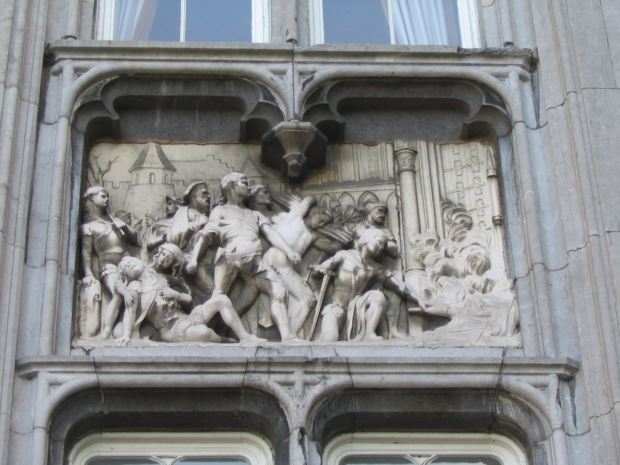 Bas-relief représentant la Måle Saint-Martin sur la façade néogothique ouest du Palais provincial de Liège (Palais des Princes-Évêques de Liège)